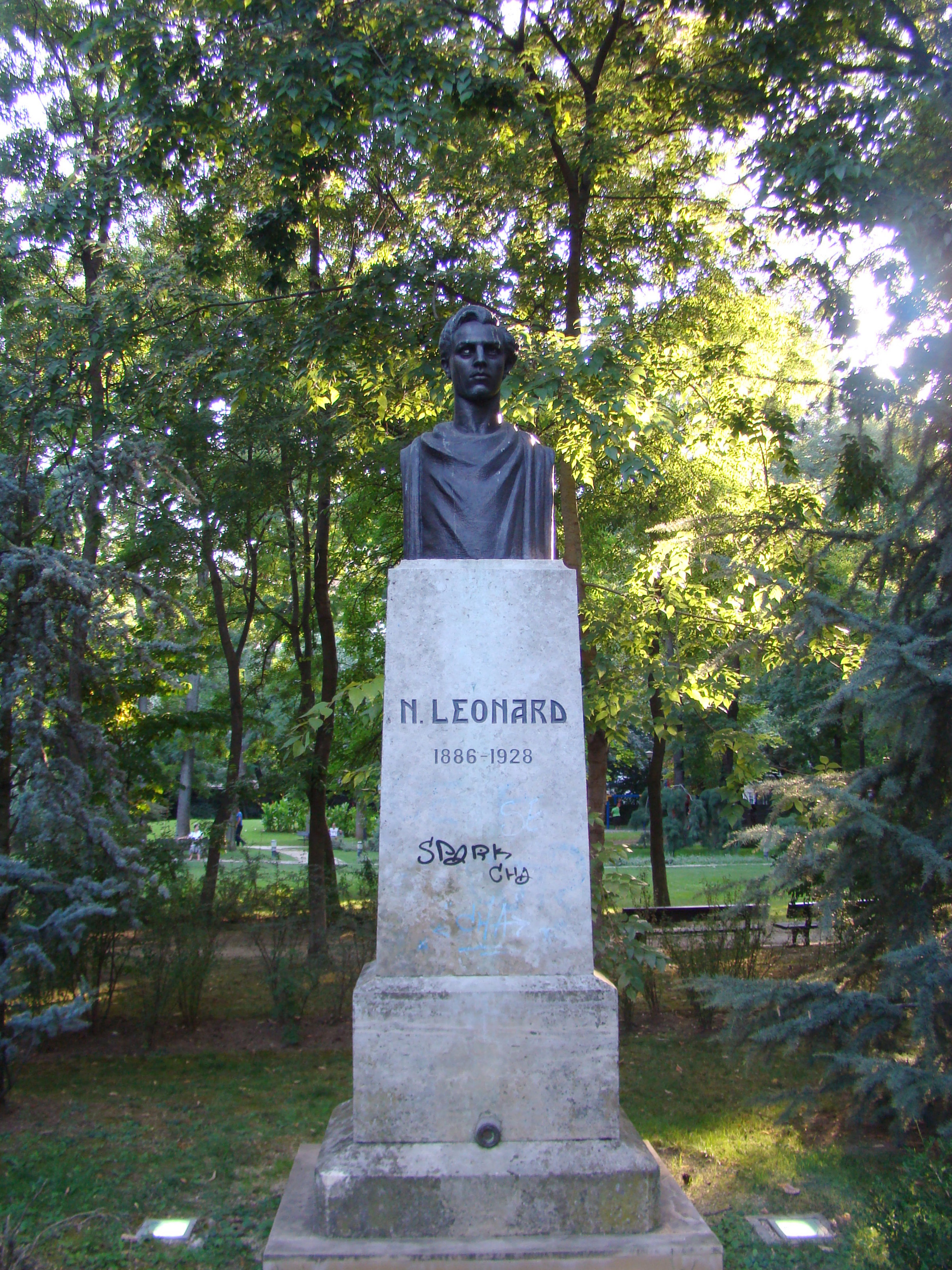 Bustul lui Nicolae Leonard din Parcul Kiseleff